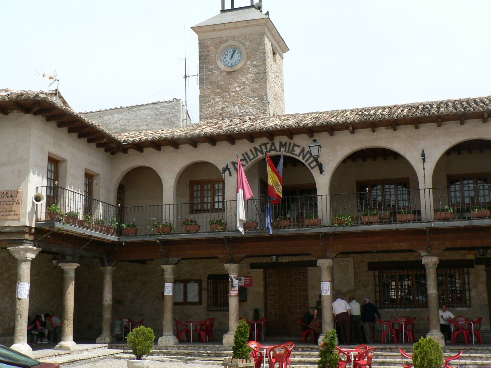 Budia-Ha pasado a la literatura sobre todo por su presencia en el Viaje a la Alcarria de Camilo José Cela el 9 de junio de 1946, donde describe la plaza: "parece la de un pueblo moro". Vista principal del Ayuntamiento.